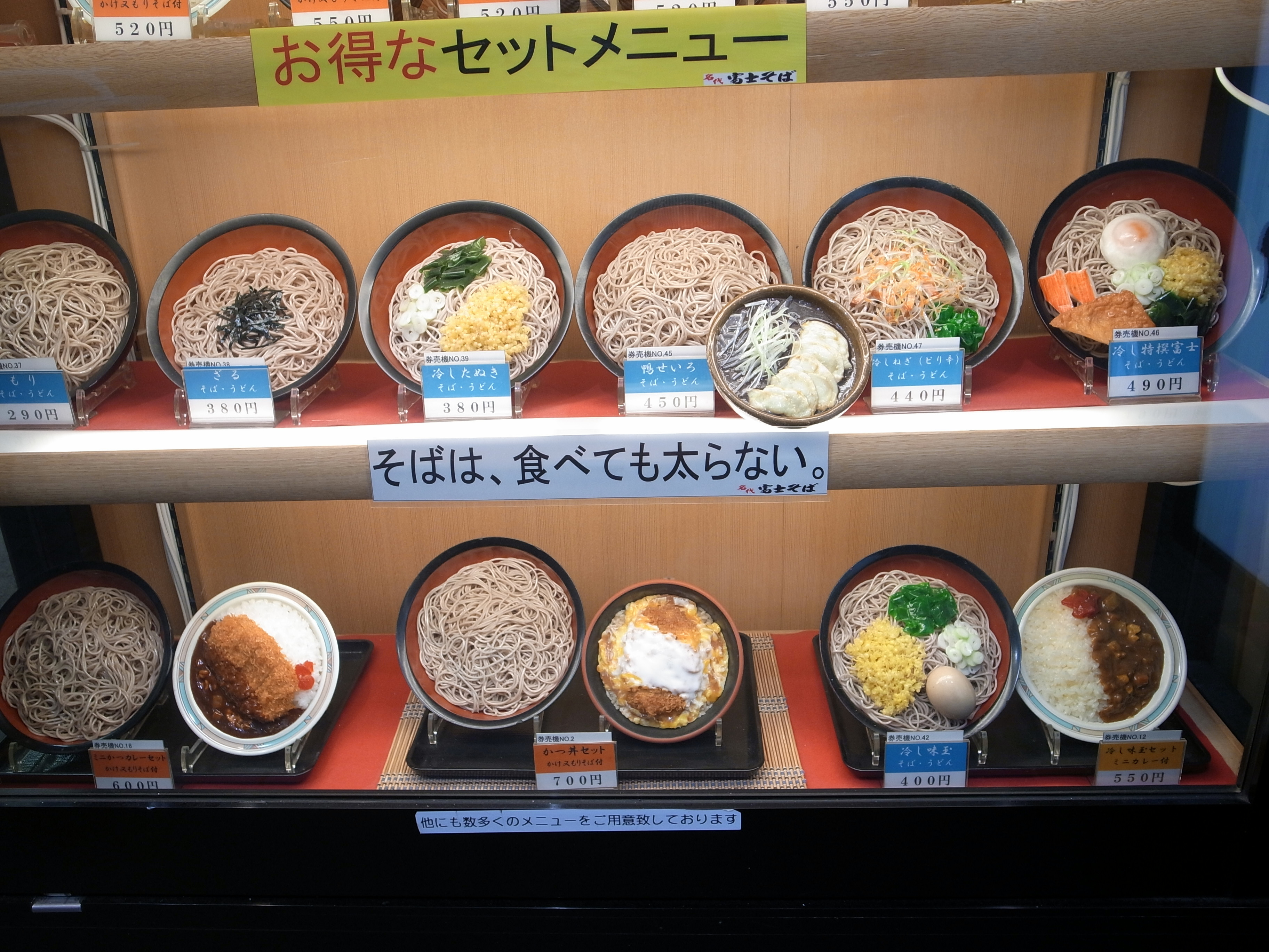 そばは、食べても太らない 名代 富士そば "お得なセットメニュー""そばは、食べても太らない""他にも数多くのメニューをご用意致しております" Upper left to right: もり, ざる, 冷したぬき, 鴨せいろ, 冷しねぎ（ピリ辛）, 冷し特撰富士 Lower left to right: ミニかつカレーセット, かつ丼セット, 冷し味玉, 冷し味玉セット ミニカレー付